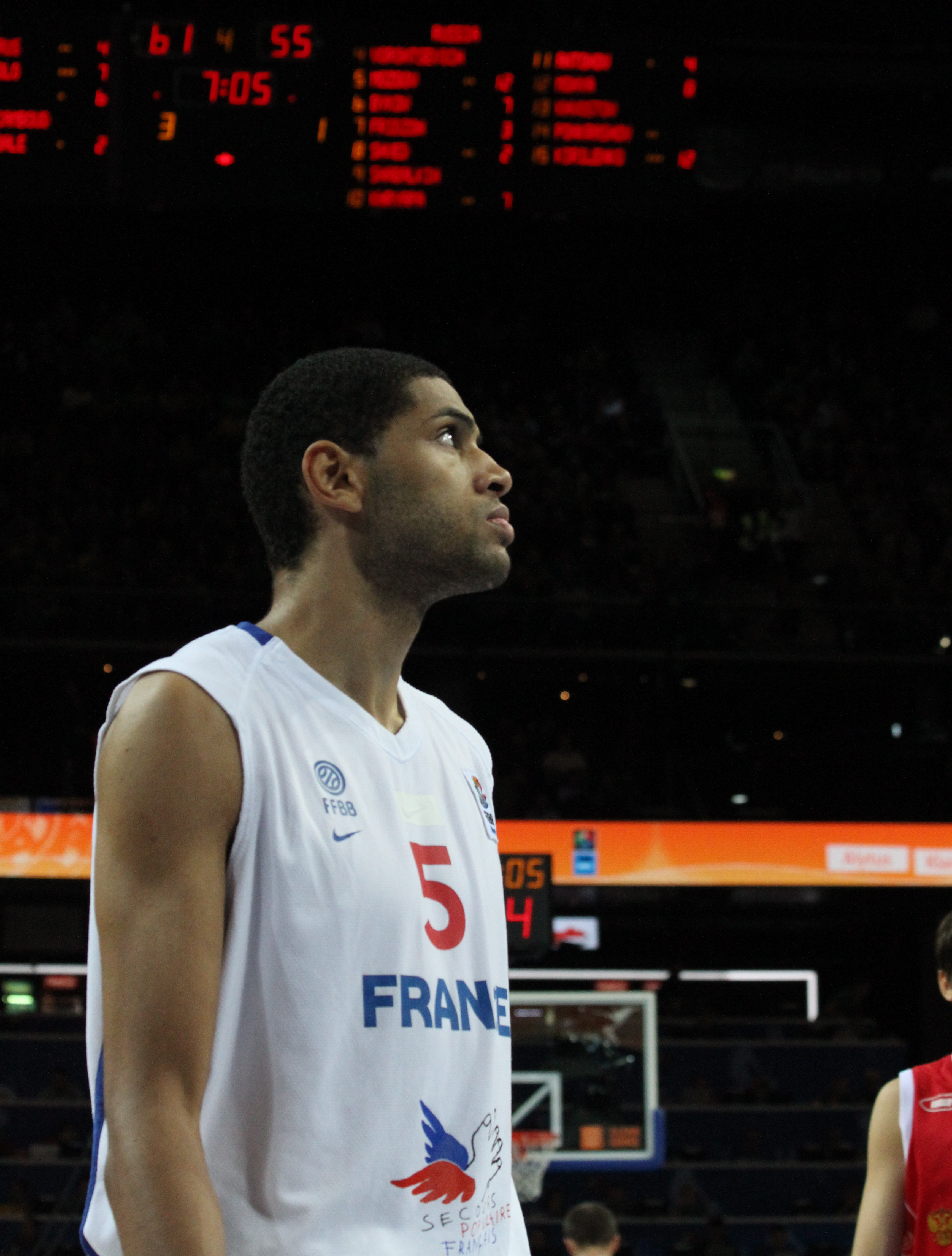 Nicolas Batum à l'EuroBasket 2011. Match France-Russie le 16 septembre 2011.